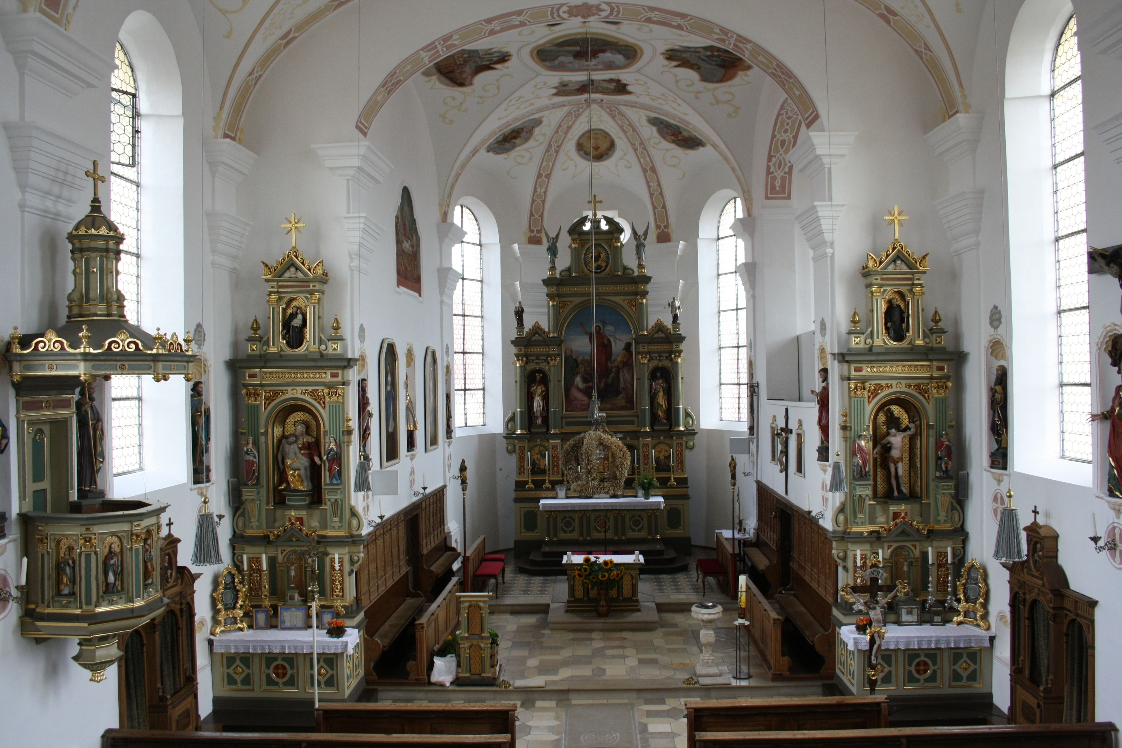 Katholische Pfarrkirche St. Ulrich und Johannes Baptist in Schwenningen im Landkreis Dillingen an der Donau, Innenraum